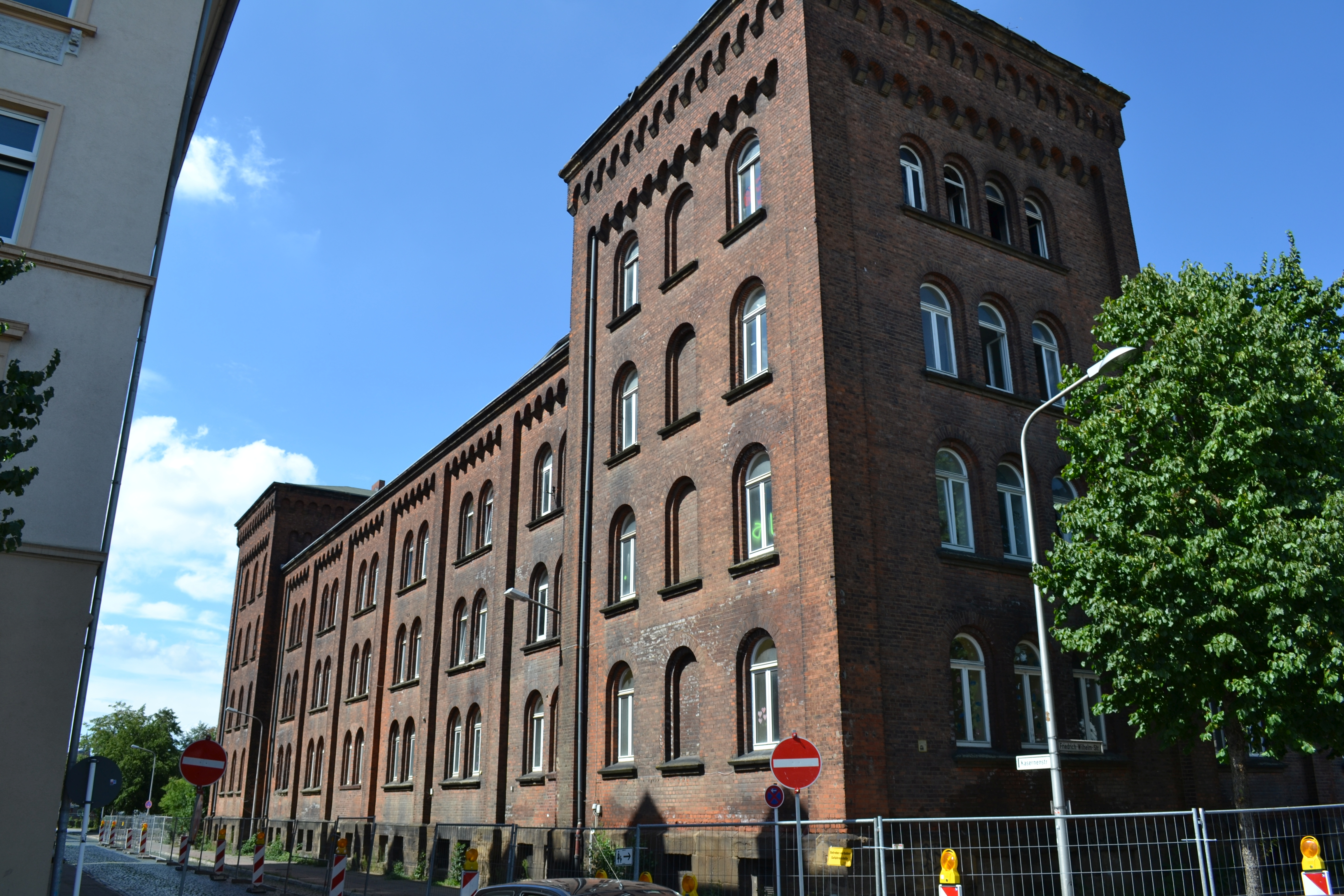 Bahnhofskaserne Minden, nach dem Brand im Augustr 2015, Südflügel in der Kasernenstraße